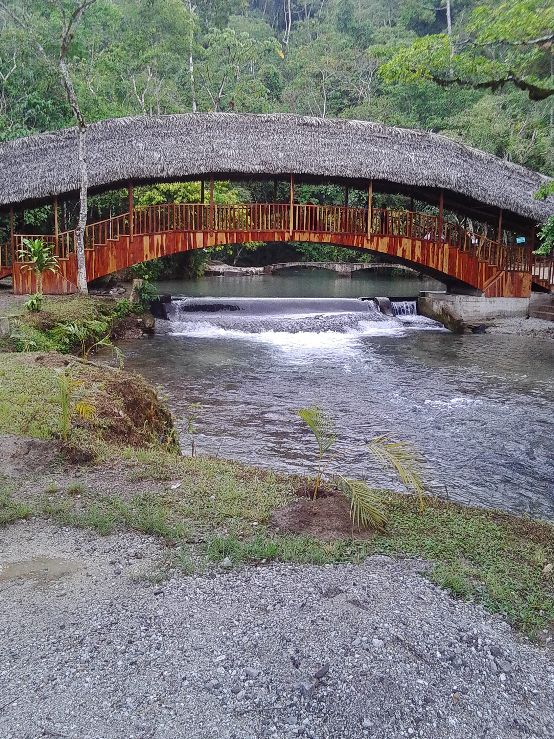 Río Tioyacu, que significa agua fría en Quechua.